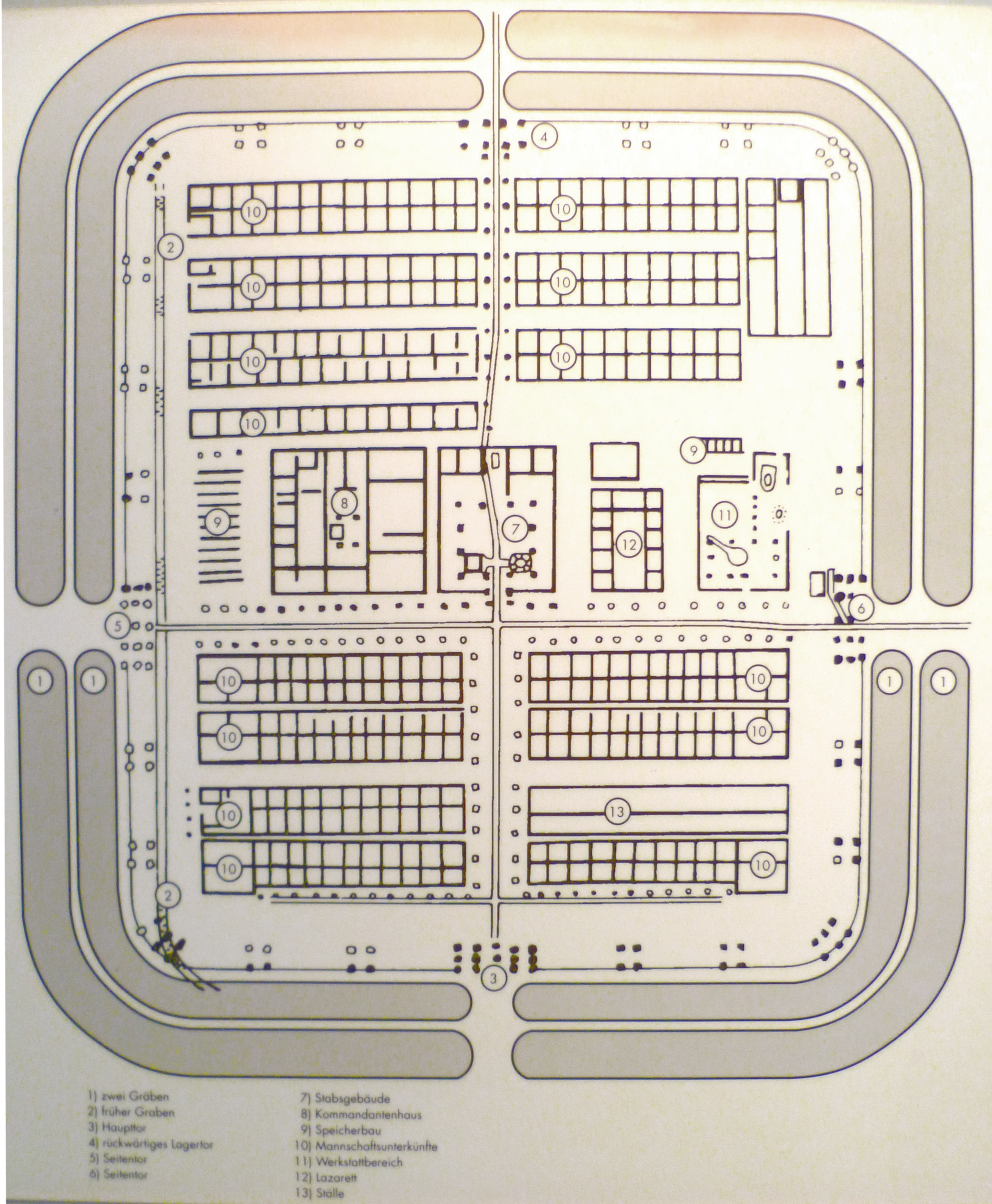 Übersichtsplan zum Steinkastell Hofheim abfotografiert bei der Ausstellung im Stadtmuseum Hofheim.